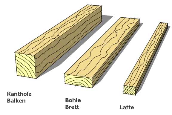 Bauschnittholz